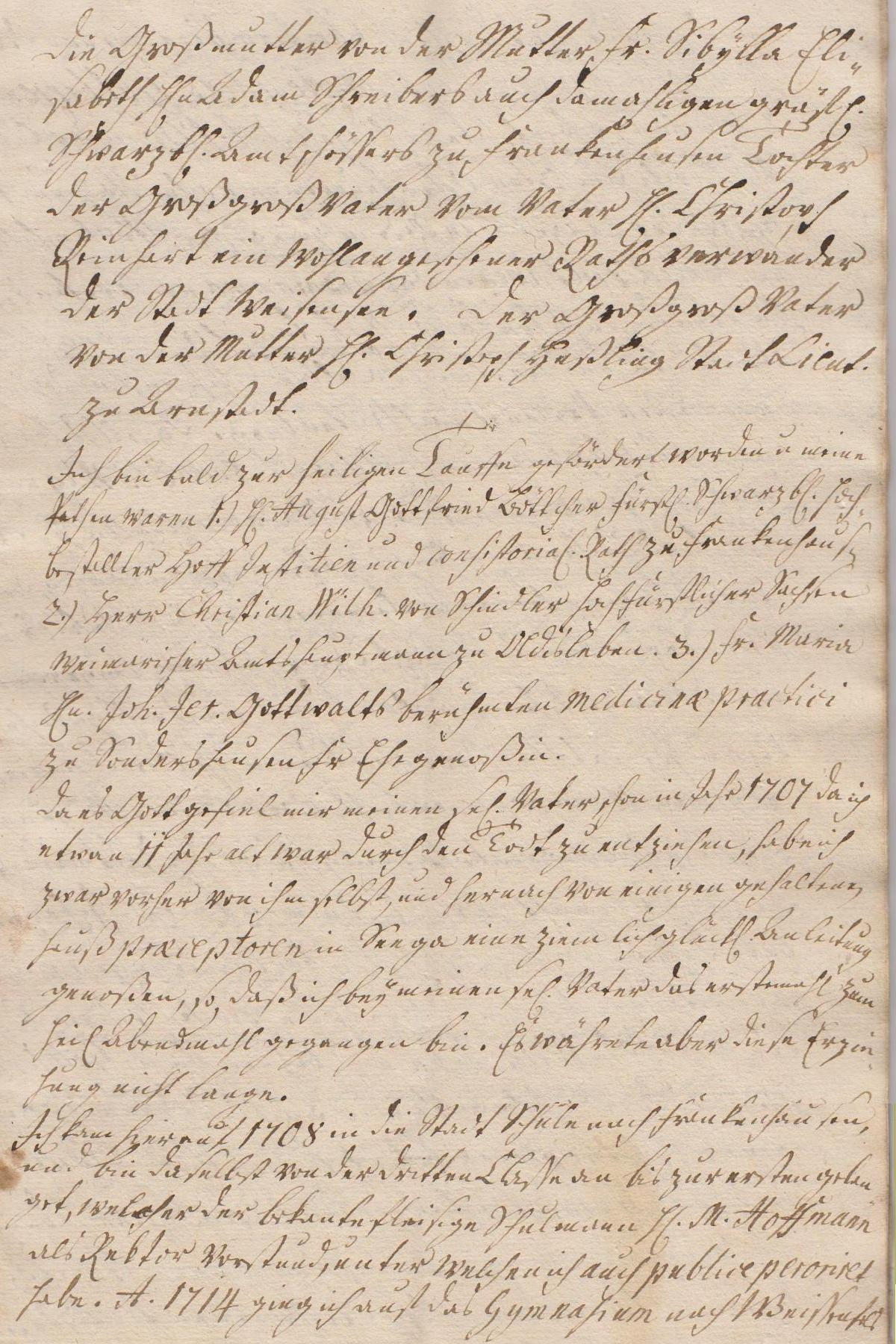 Seite 3 der Leichenpredigt für den Pastor August Wilhelm Reinhart (1696/1770), Bürger der Stadt Heringen an der Helme.